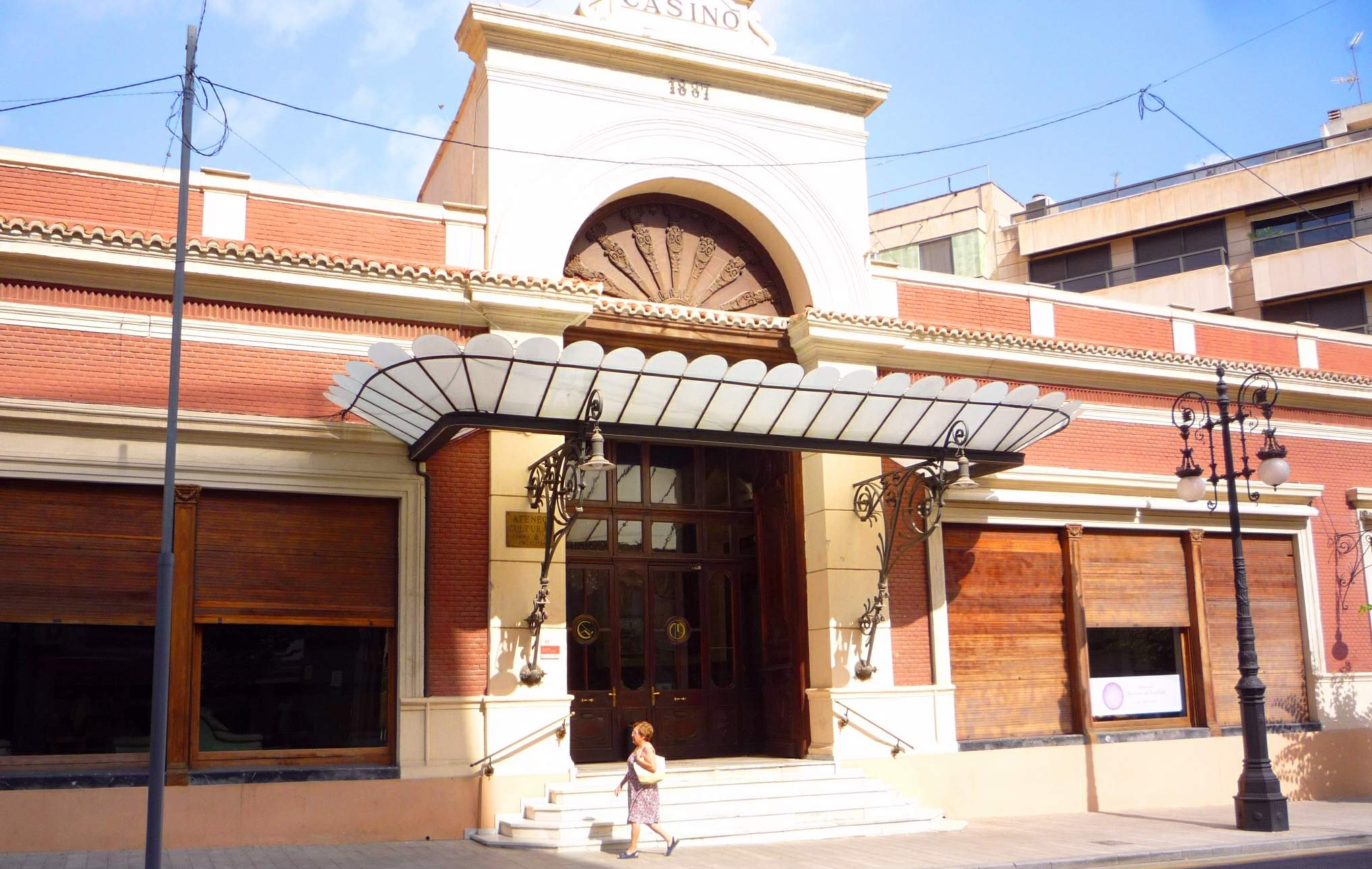 Orihuela - Ateneo Cultural Casino Orcelitano